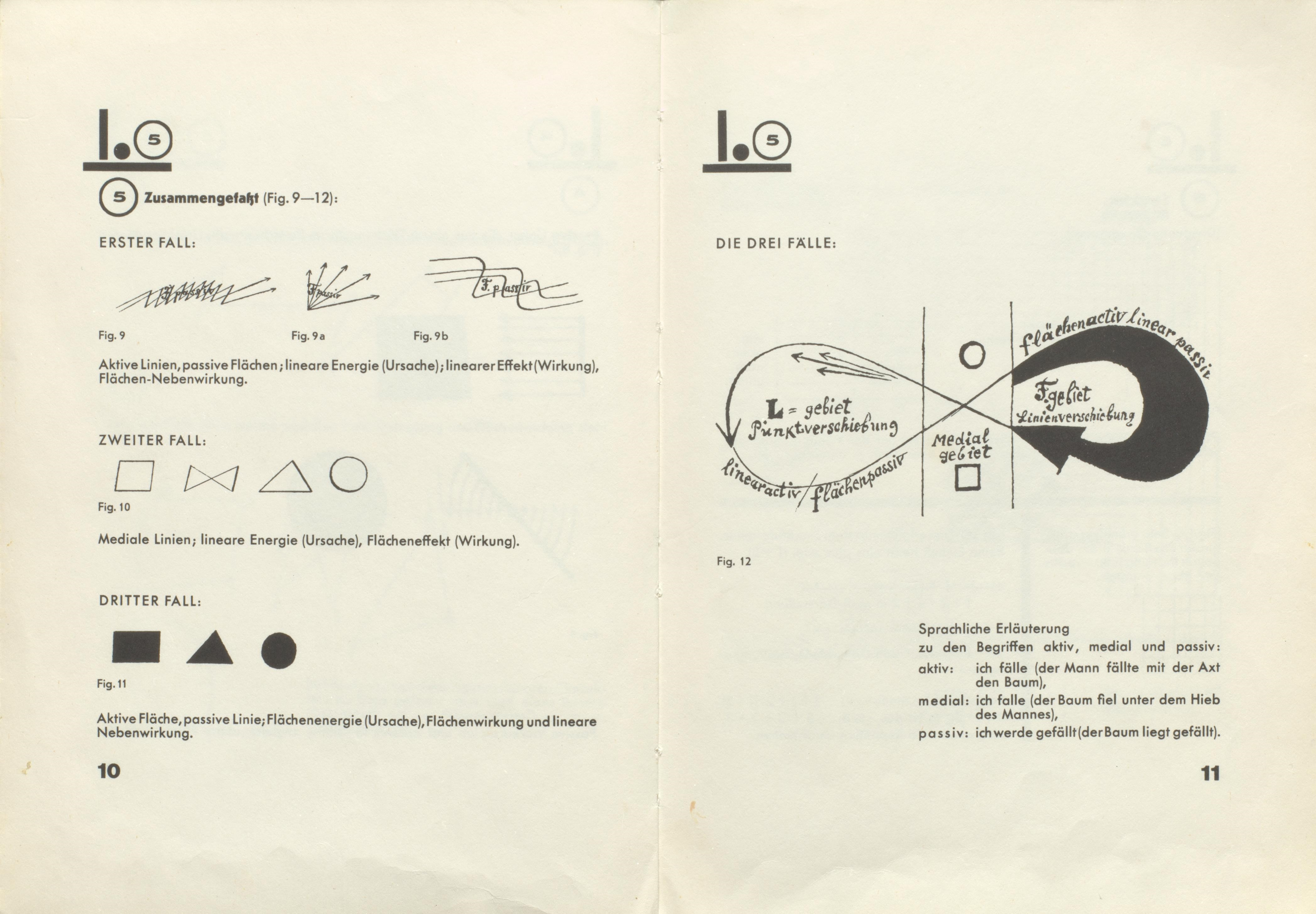 Paul Klee: Pädagogisches Skizzenbuch. Bauhausbücher, Band 2, München 1925, Seite 10